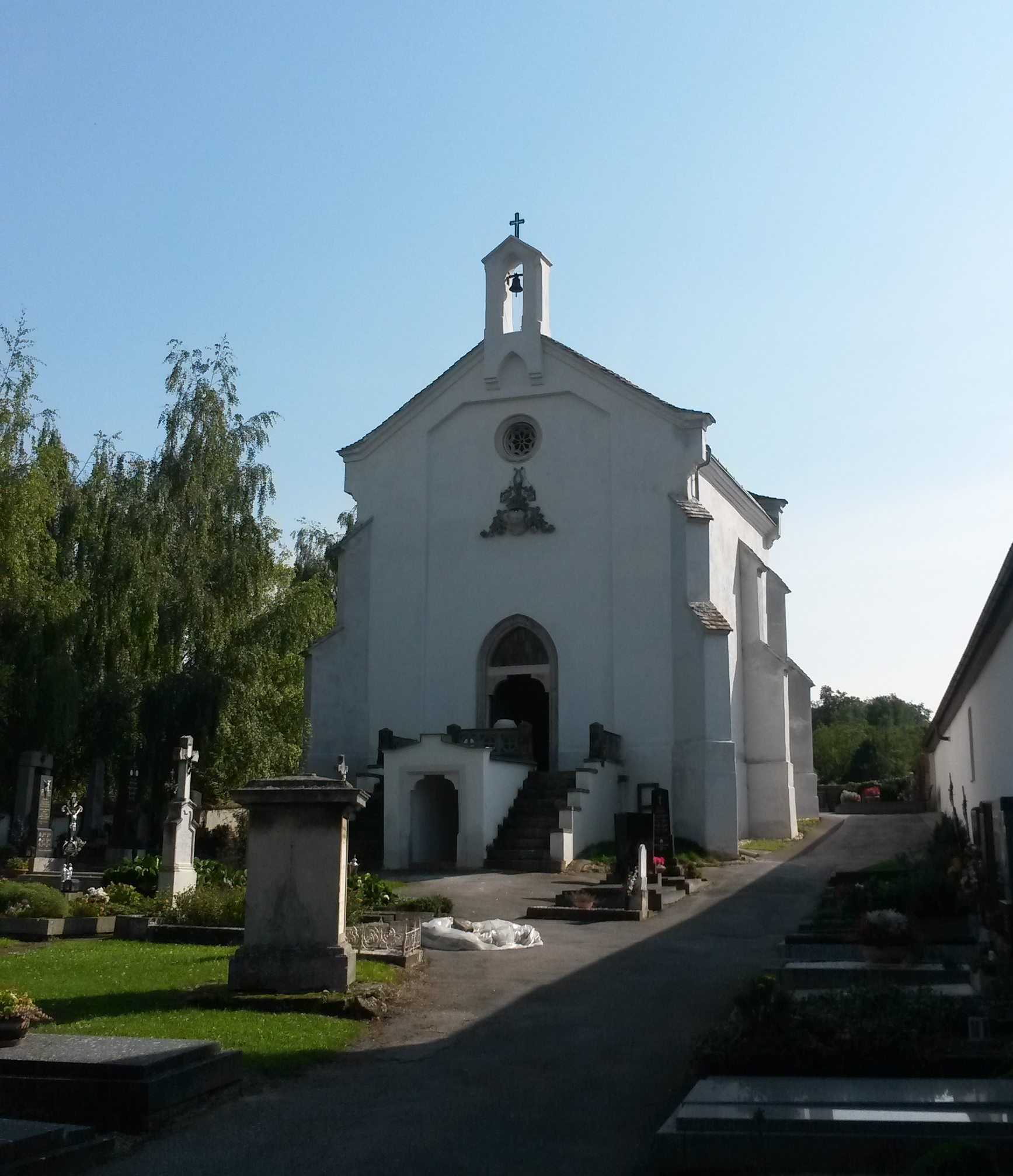 Fassade der Gruftkapelle der Fünfkirchen - nach der Renovierung Sommer 2014